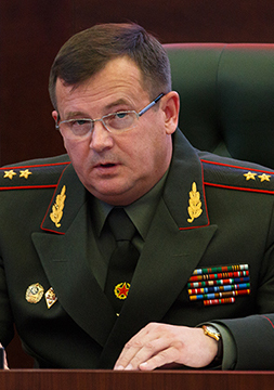 Министр обороны Республики Беларусь генерал-лейтенант Андрей Алексеевич Равков